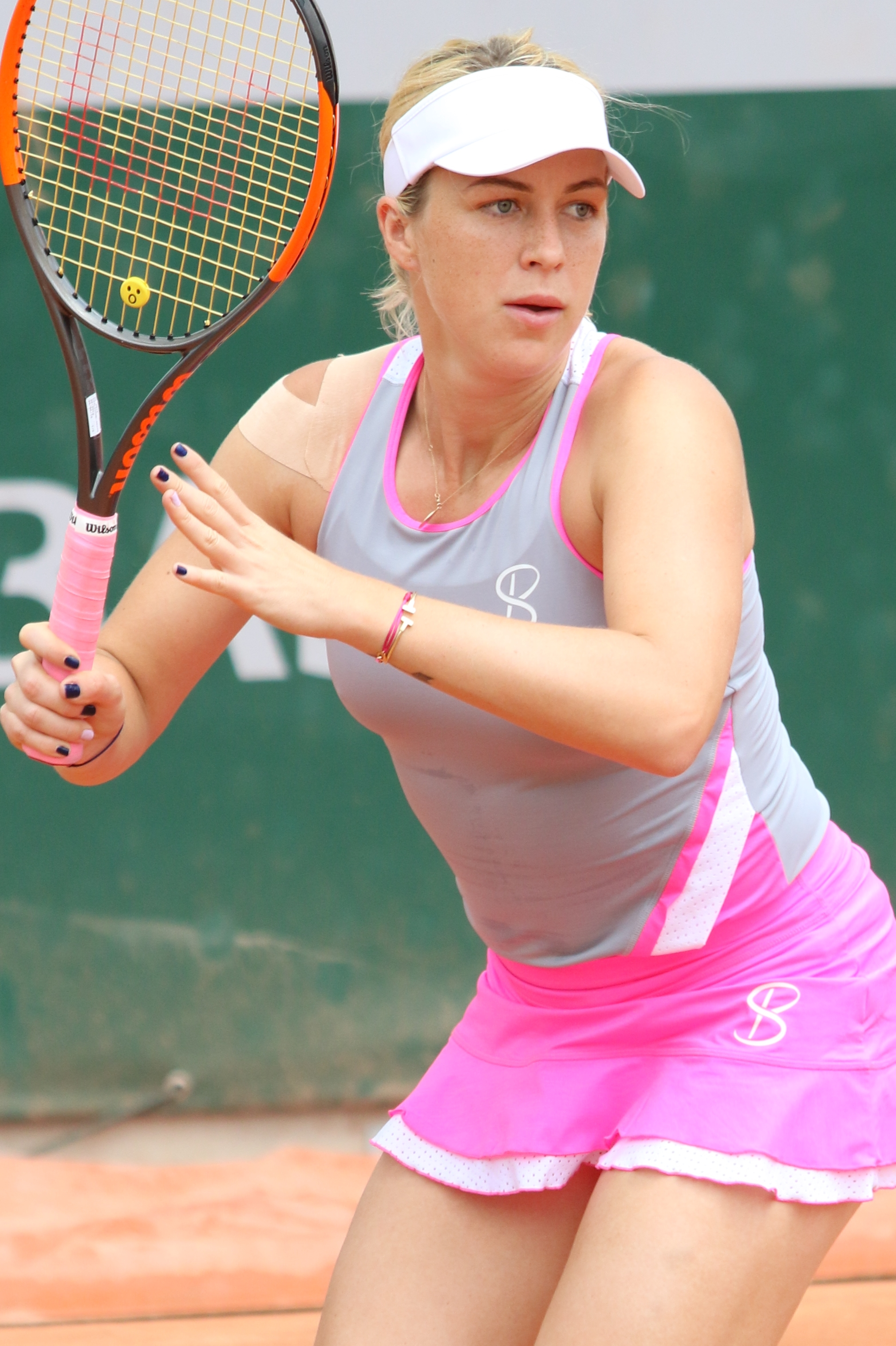 Pavlyuchenkova RG18 (32)